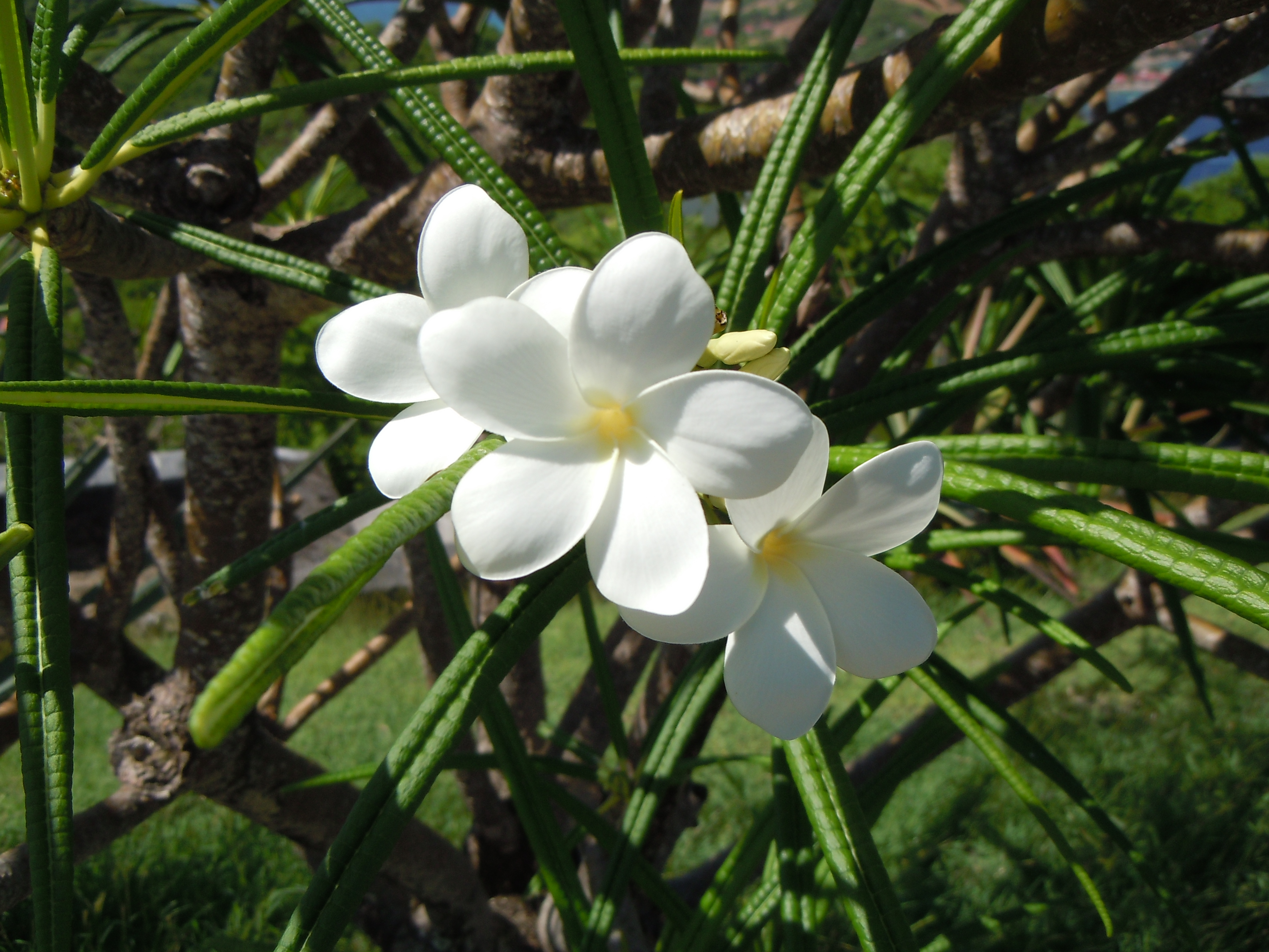 Plumeria alba (Les Saintes)